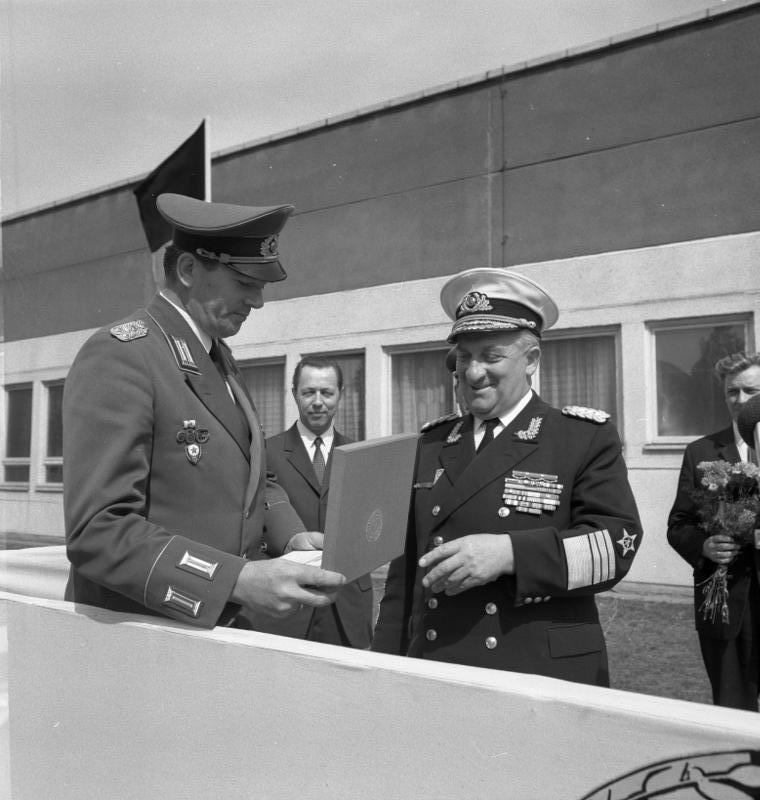 Berlin, 20 Jahre Zentrales Orchester der NVA Zentralbild/Mittelstädt 4.5.71 Berlin: 20 Jahre Zentrales Orchester der NVA Den Kampforden für Verdienste um Volk und Vaterland in Gold verlieh während eines feierlichen Appells am 4.5.71 der Stellvertreter des Ministers für Nationale Verteidigung und Chef der Politischen Hauptverwaltung der NVA, Admiral Waldemar Verner (r.), an das Zentrale Orchester der NVA. Die Auszeichnung nahm der Leiter des Orchesters, Musikdirektor Oberst Gerhard Baumann (l.), entgegen. Abgebildete Personen: Verner, Waldemar: Stellvertretender Minister für Verteidigung, Vizeadmiral, Chef der Politischen Hauptverwaltung der NVA, Zentralkomitee der SED, DDR Baumann, Gerhard: Oberst, Generalmusikdirektor, DDR